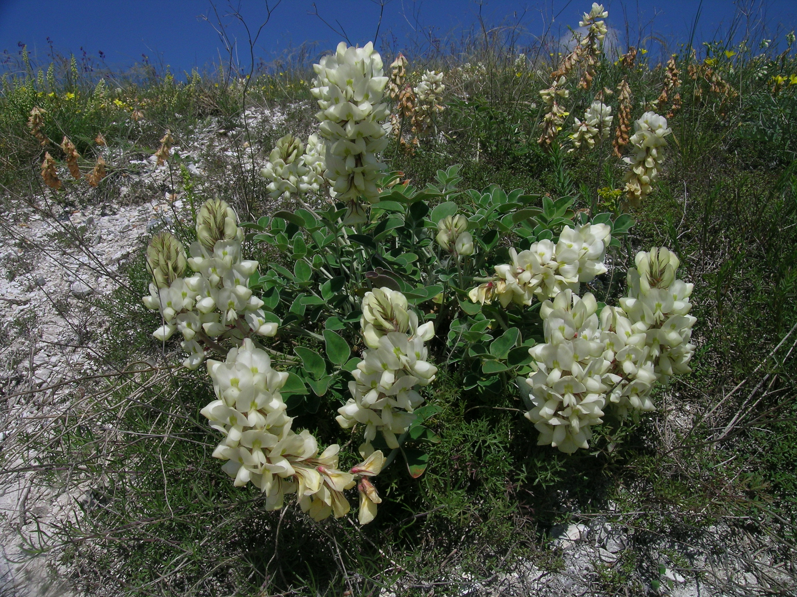 Копеечник крупноцветковый (Биберштейна ?). Стенки Изгорья.